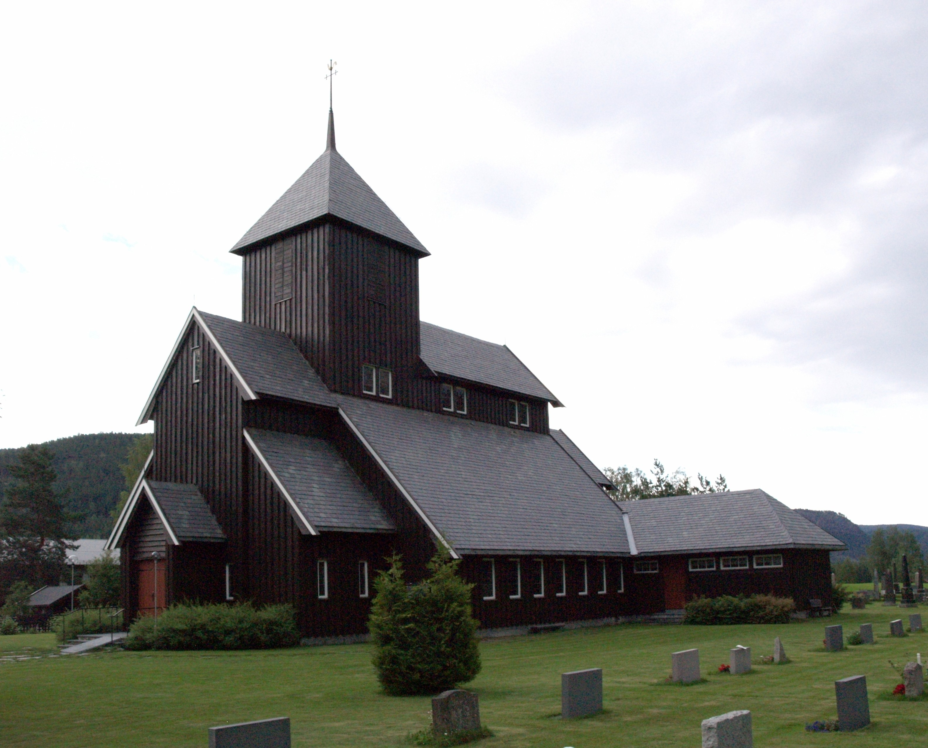 Begnadalen kirke at Tollefsrud